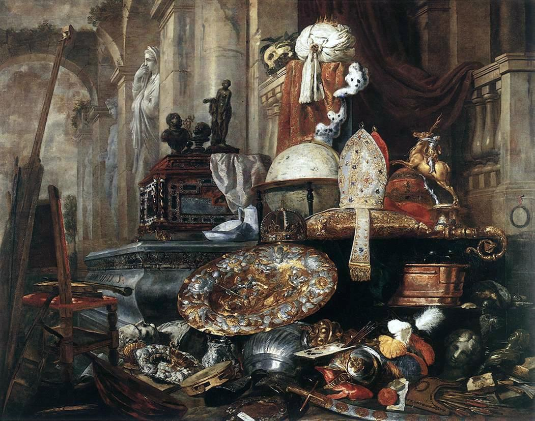 Still Life